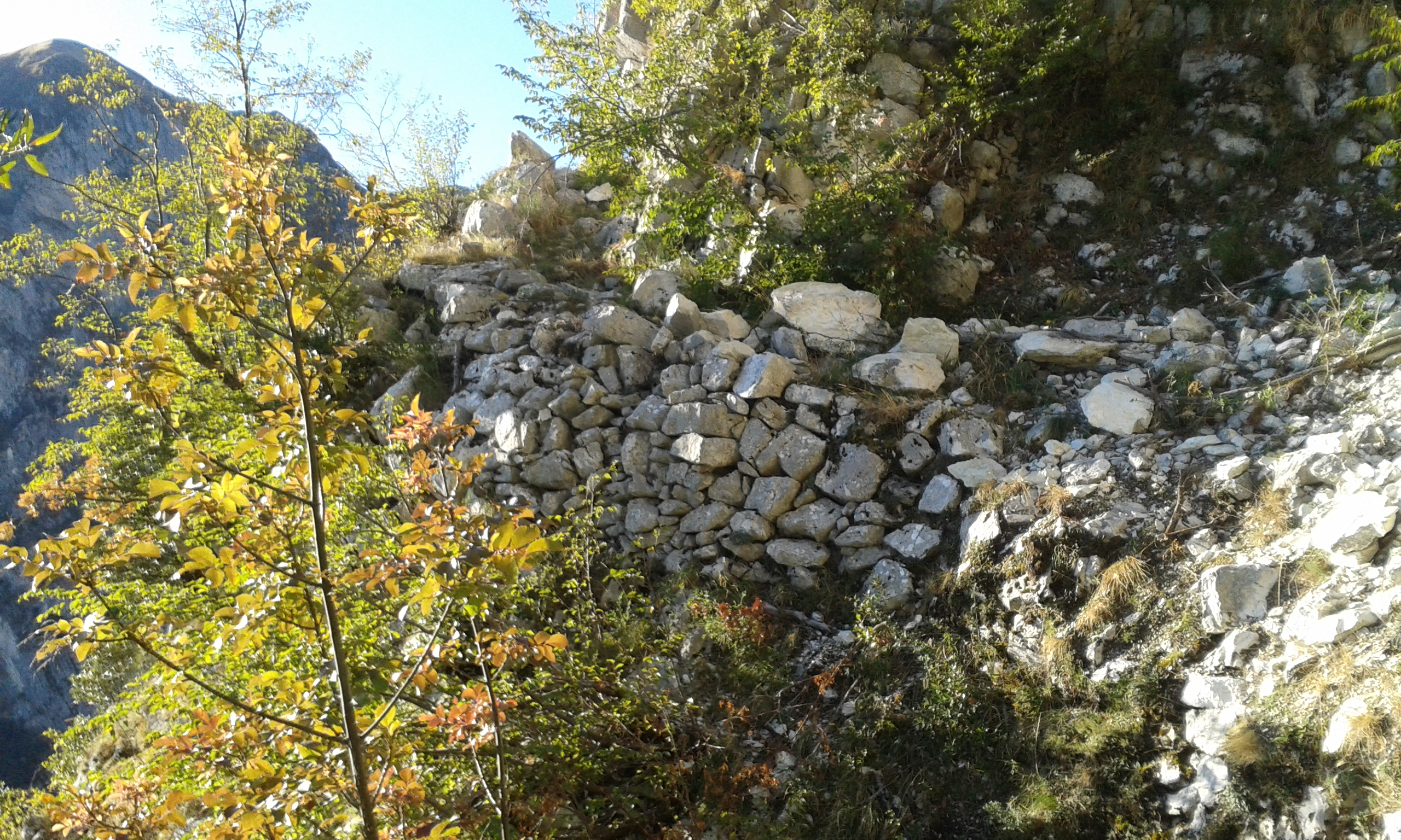 Monti Sibillini: resti delle murature di contenimento dell'antica strada che per Monte Pizzo conduceva da Vetice (Montefortino) all'eremo di San Leonardo